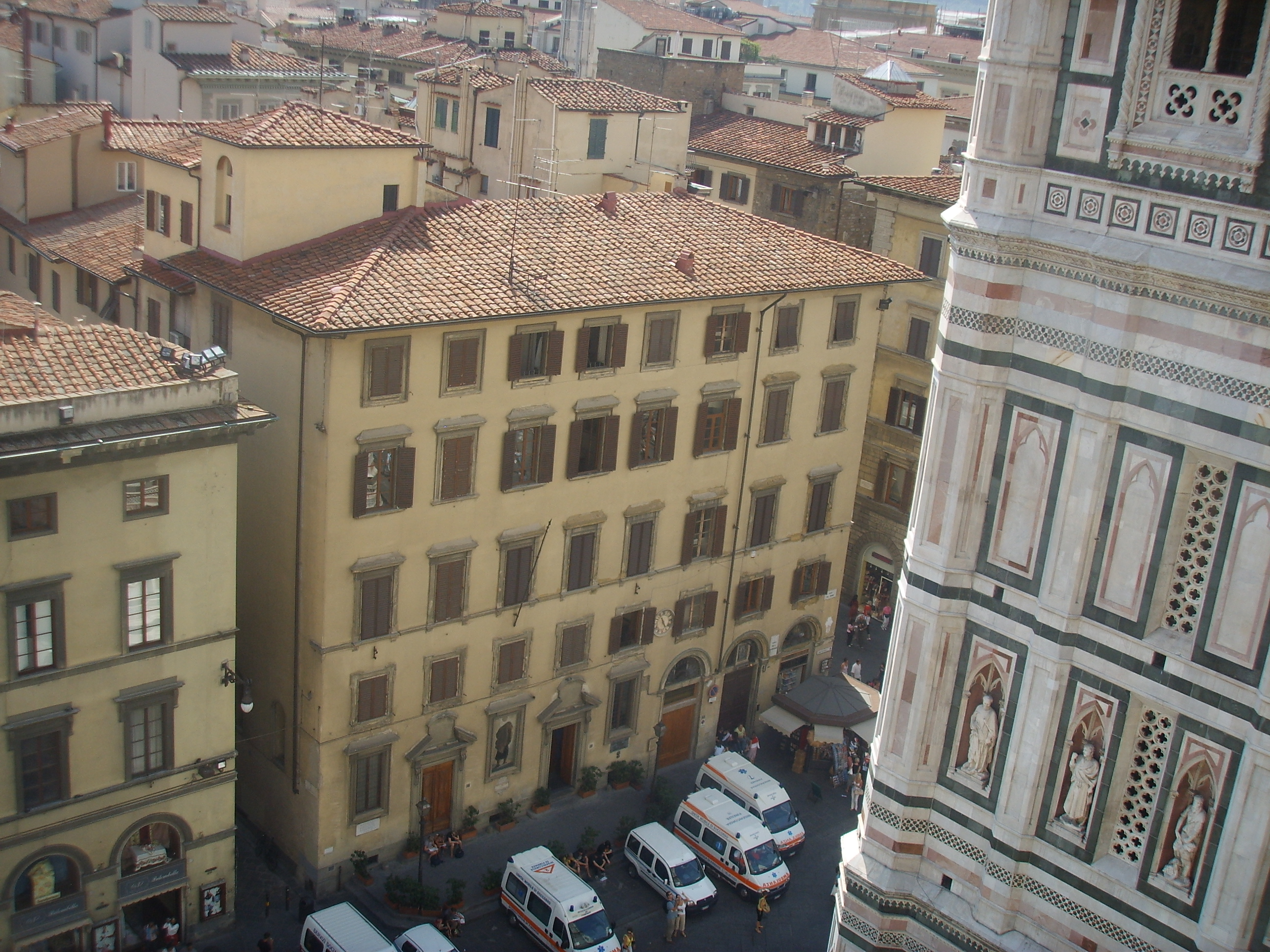 view of Misericordia's Palace in Piazza del Duomo, in Florence, italy